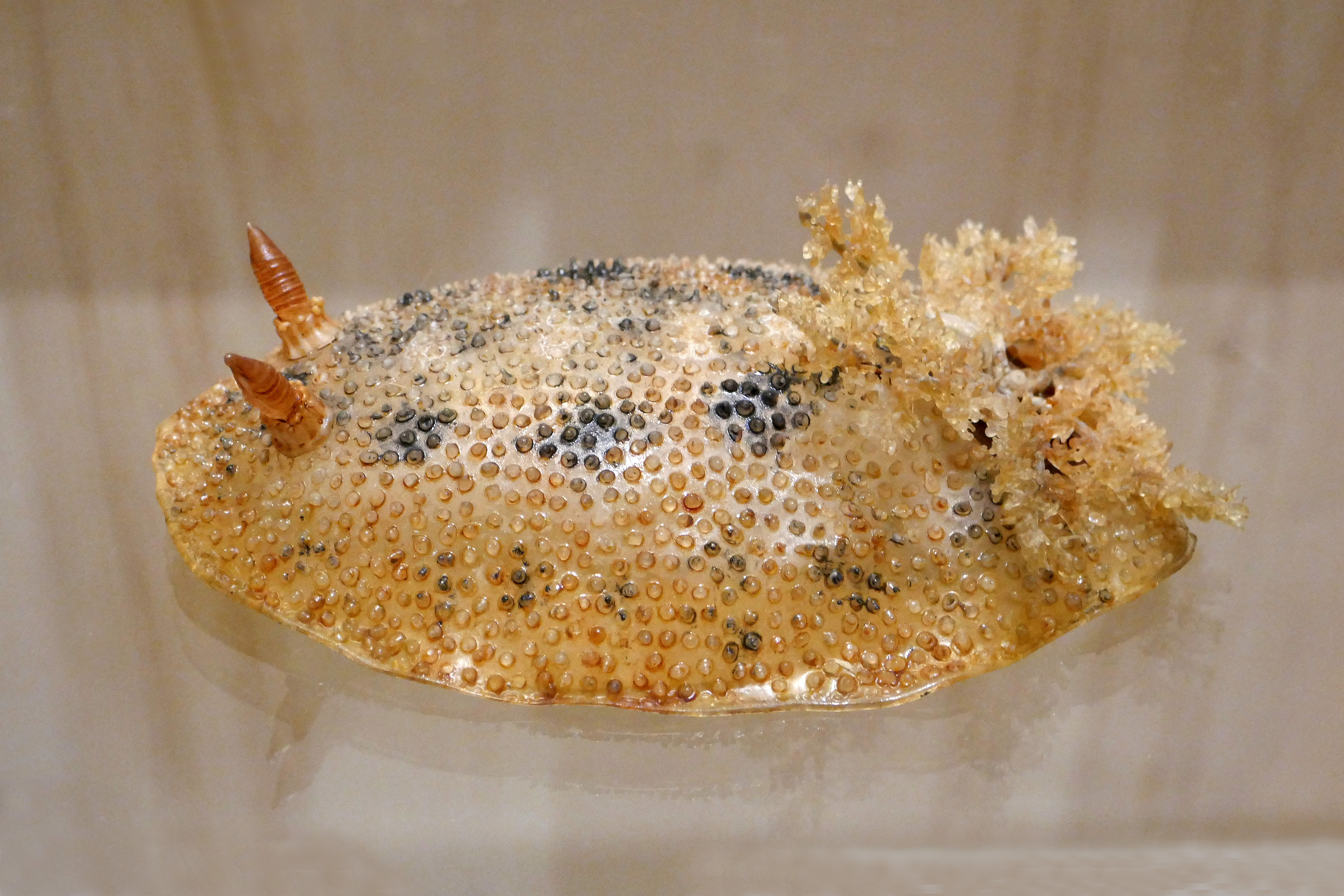 Limace de mer (Sebadoris fragilis). Modèle en verre peint de Leopold et Rudolf Blaschka. 1890. Musée zoologique de Strasbourg.